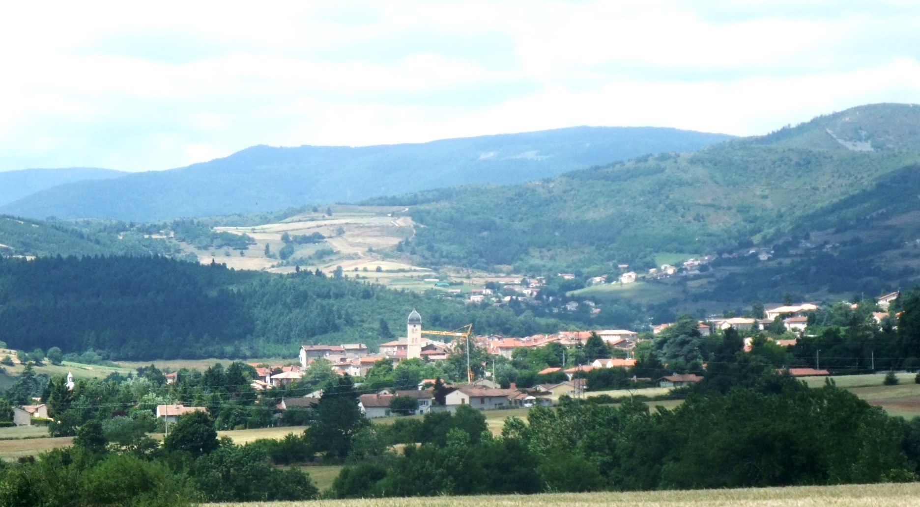 Boulieu vue générale Est